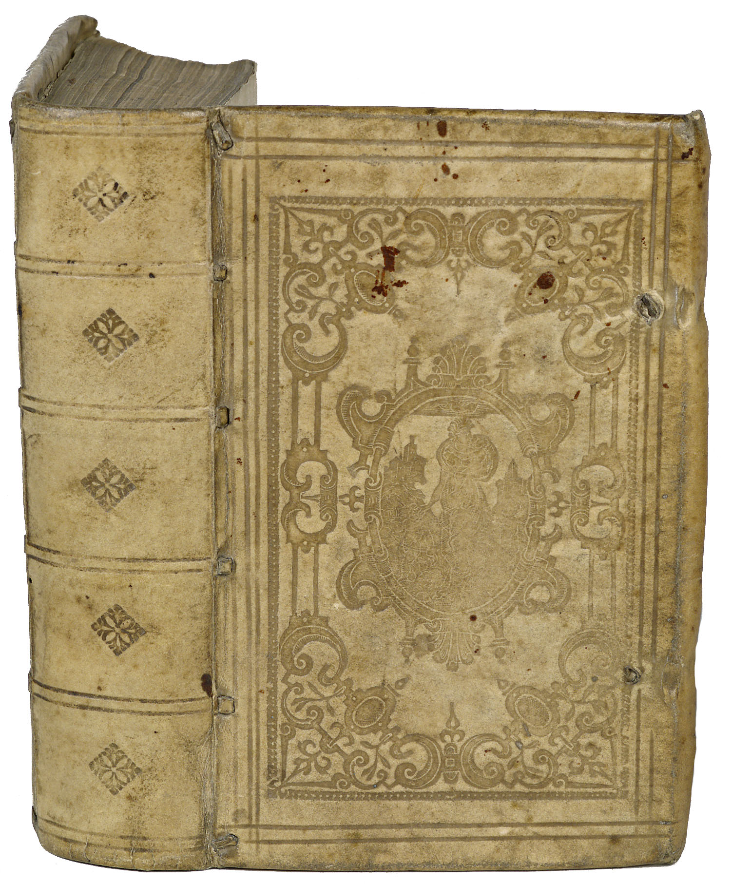 Inhoud: Den byencorf der H. Roomsche kercke [door Philips Marnix van St. Aldegonde. Z. pl.], 1593.